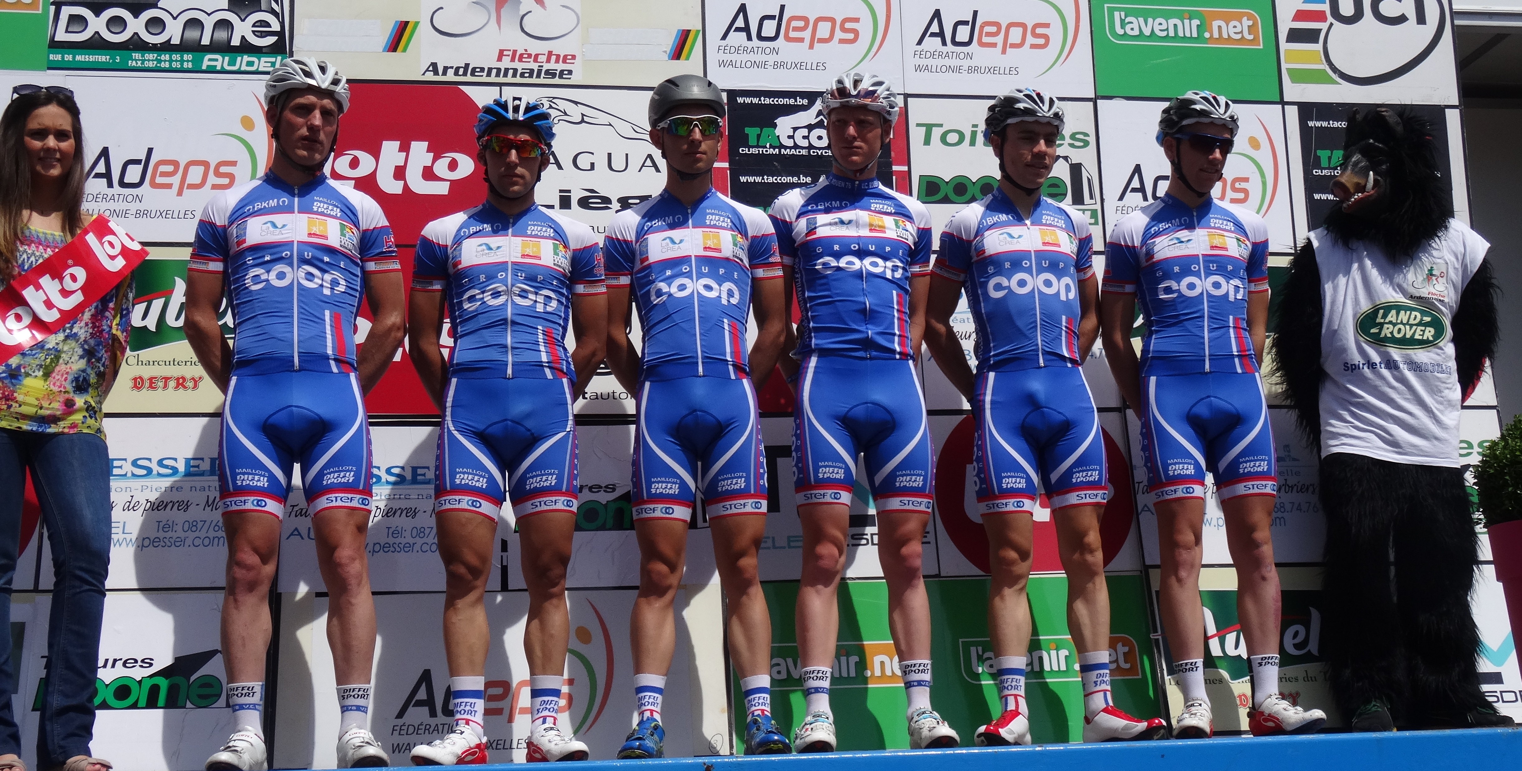 Reportage photographique réalisé le dimanche 22 juin à l'occasion du départ et de l'arrivée de la Flèche ardennaise 2014 à Herve, Belgique.